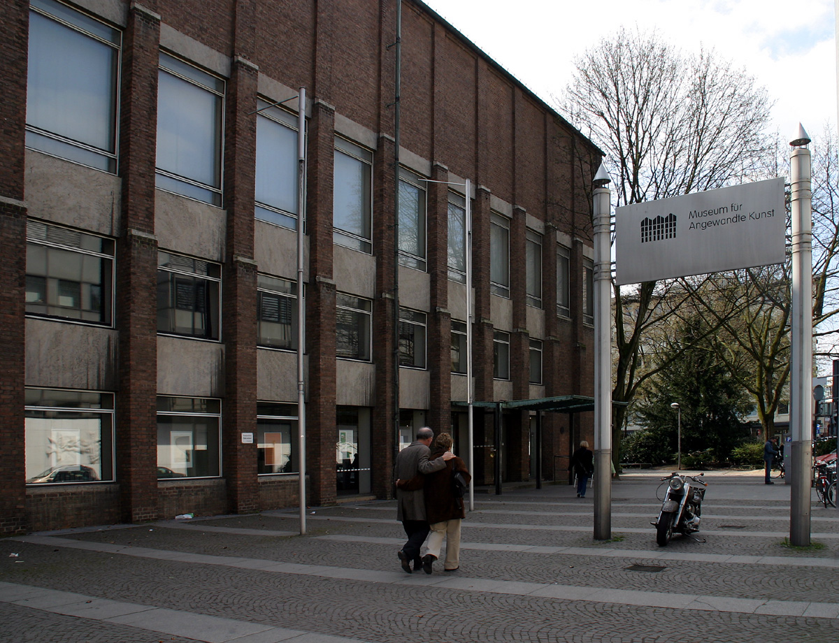 Museum für angewandte Kunst, Köln. (Museum of applied arts, Cologne, Germany)